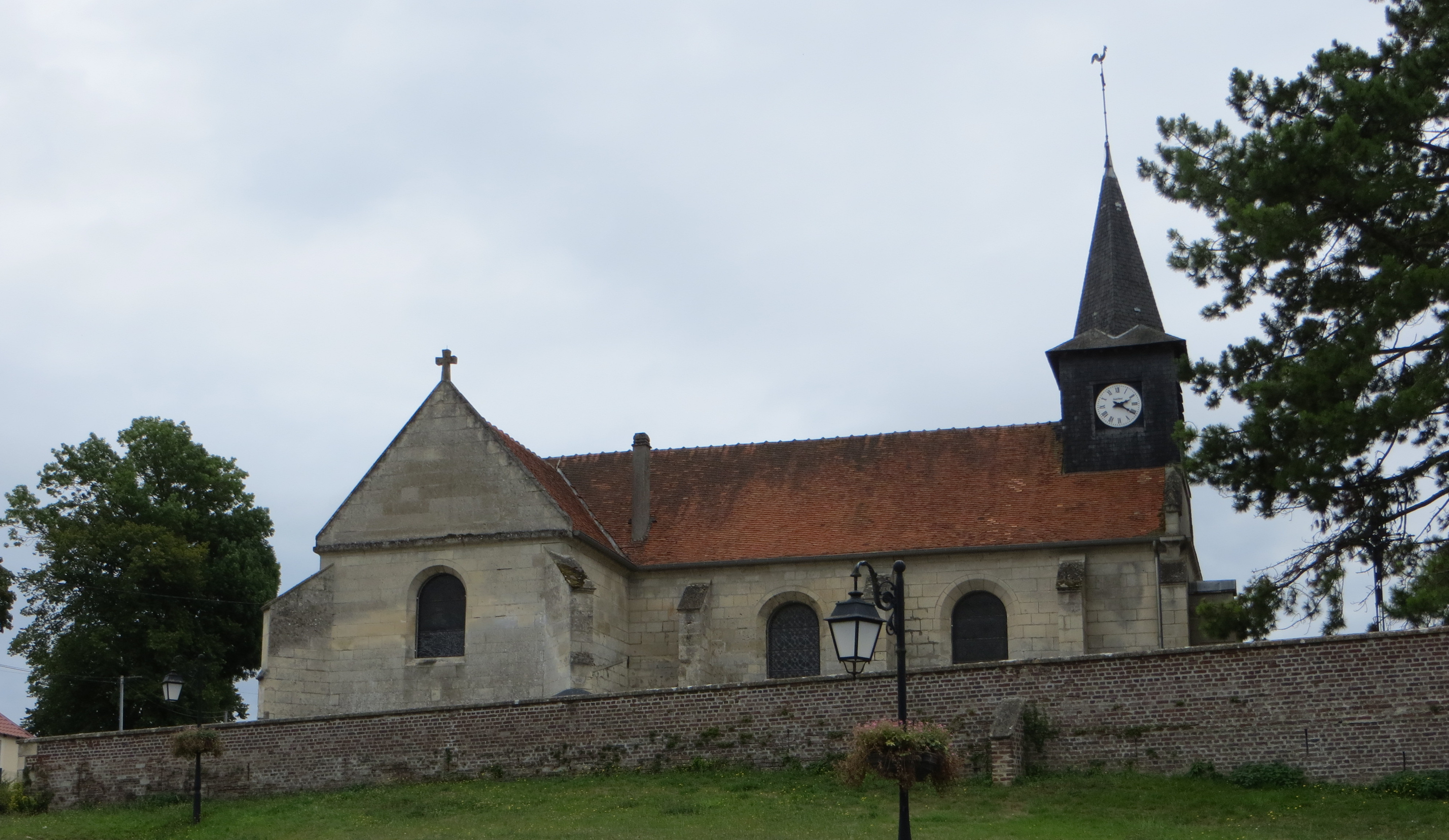 Vue générale de l'église